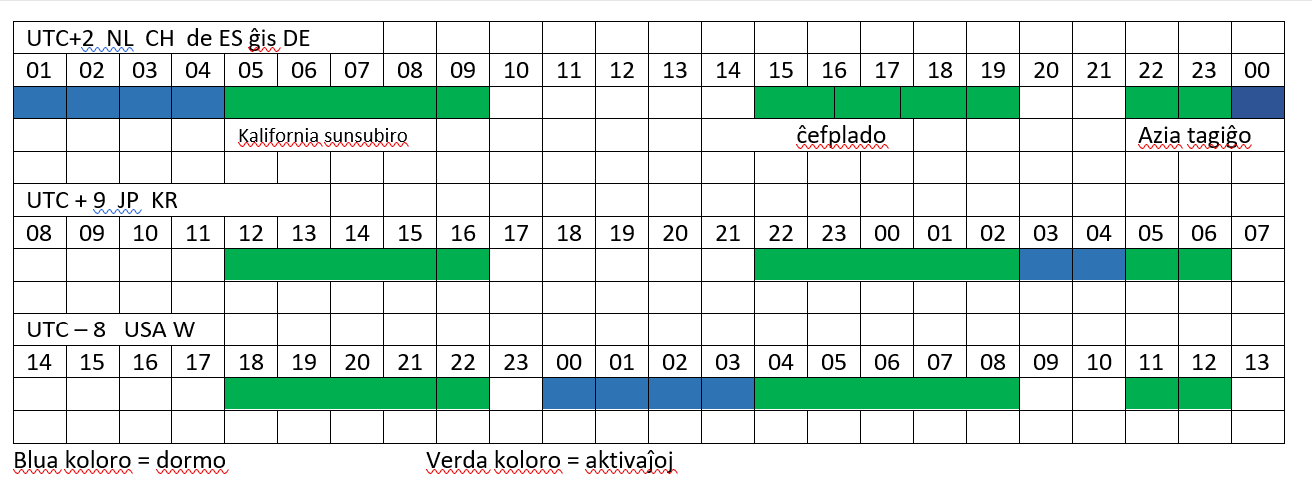 Tempoplano de la 53-a Virtuala Esperanto-Konferenco de ILEI 2020